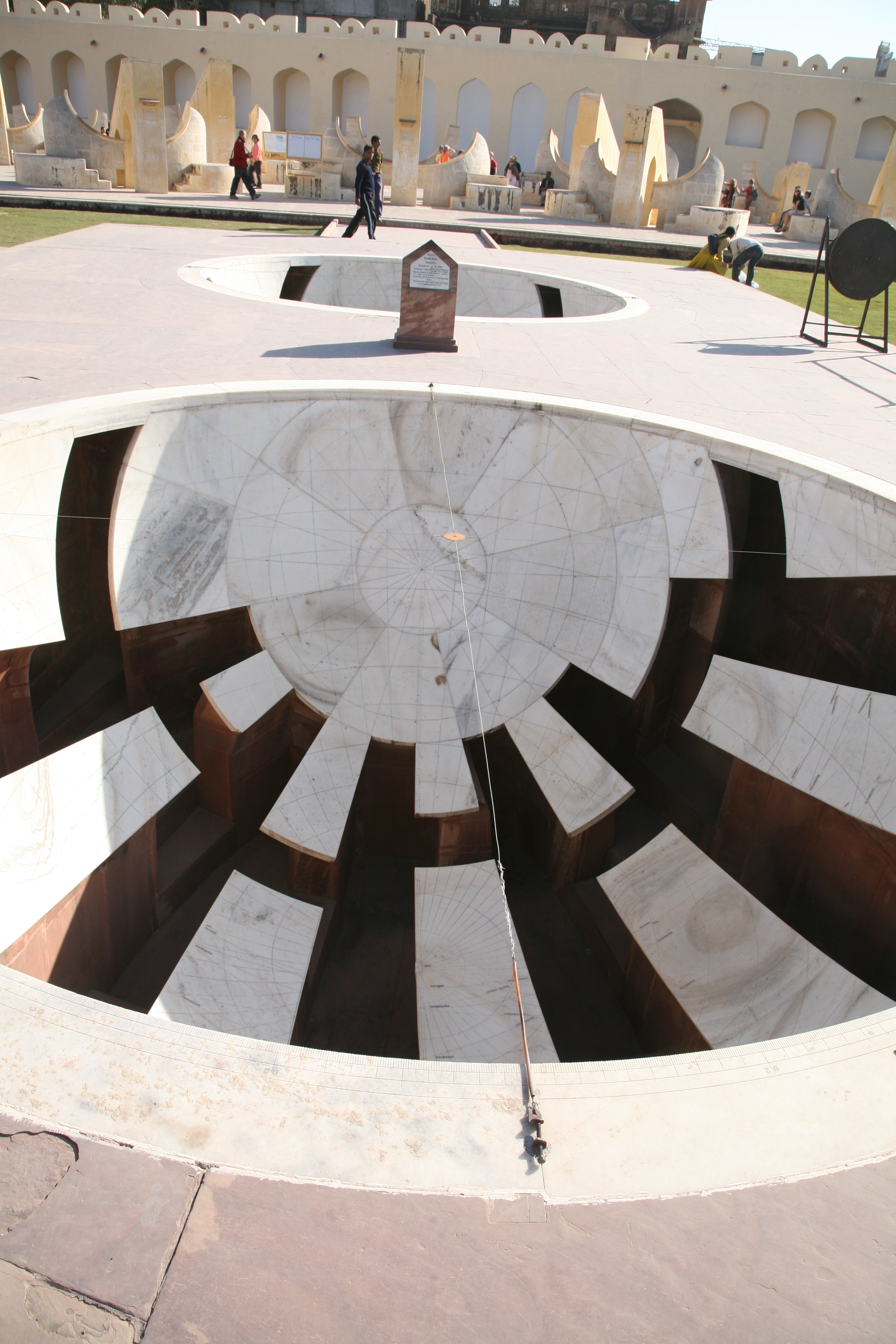 From Jantar Mantar in Jaipur.